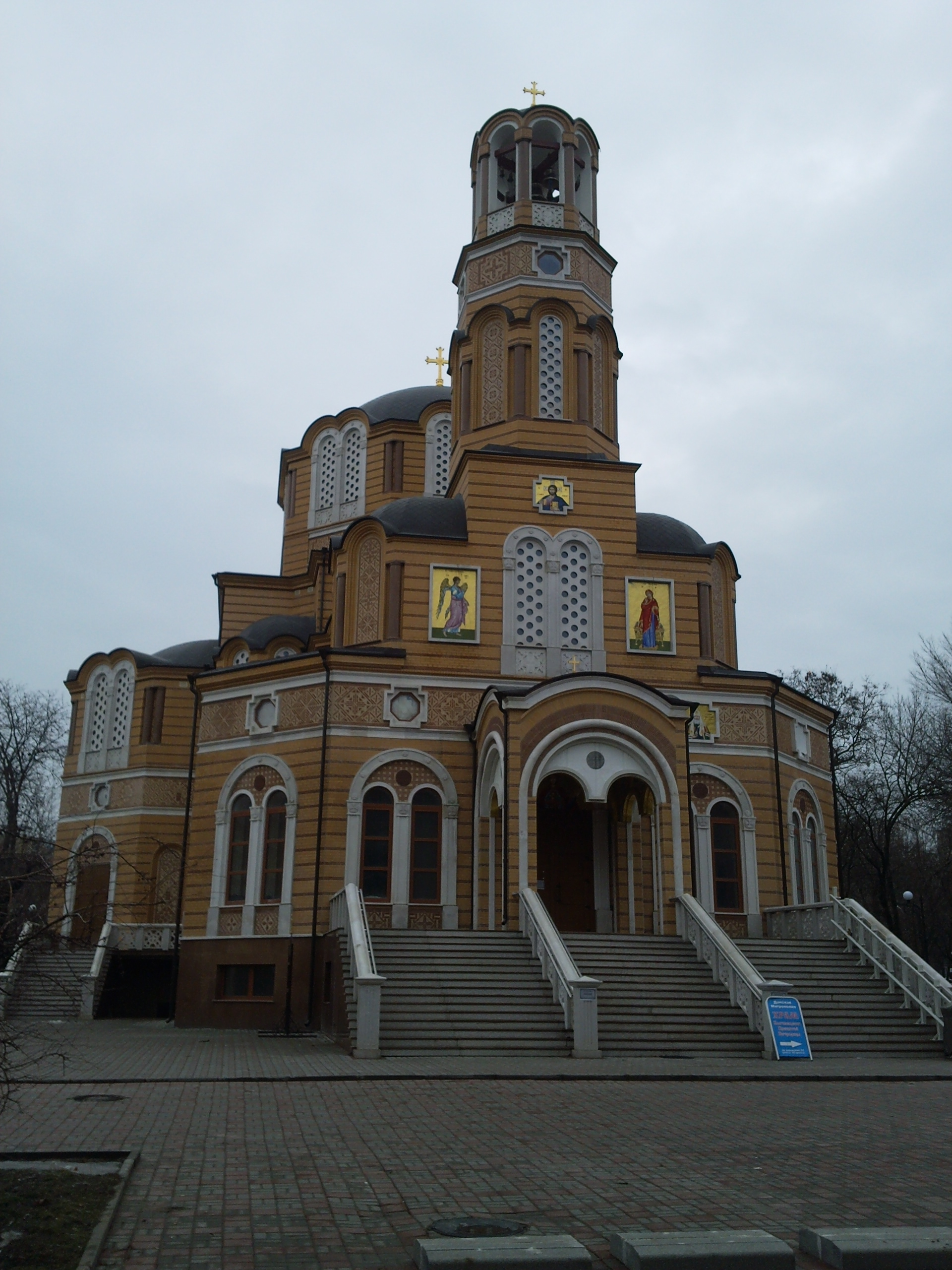 Храм построен по проекту архитектора Г. А. Шевченко.